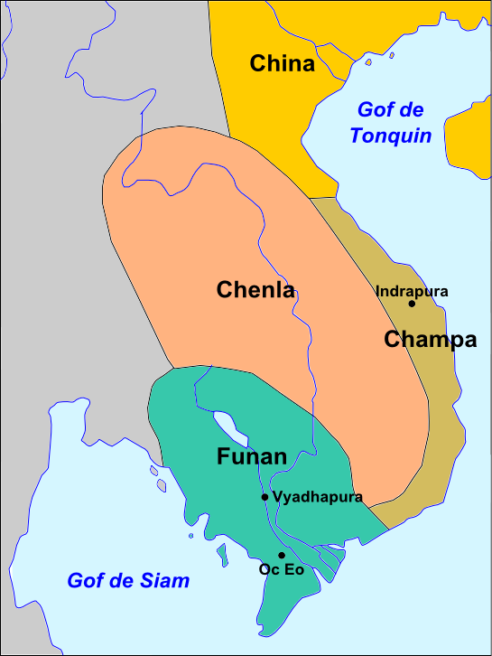 Indochina au sègle V ap. J.C.